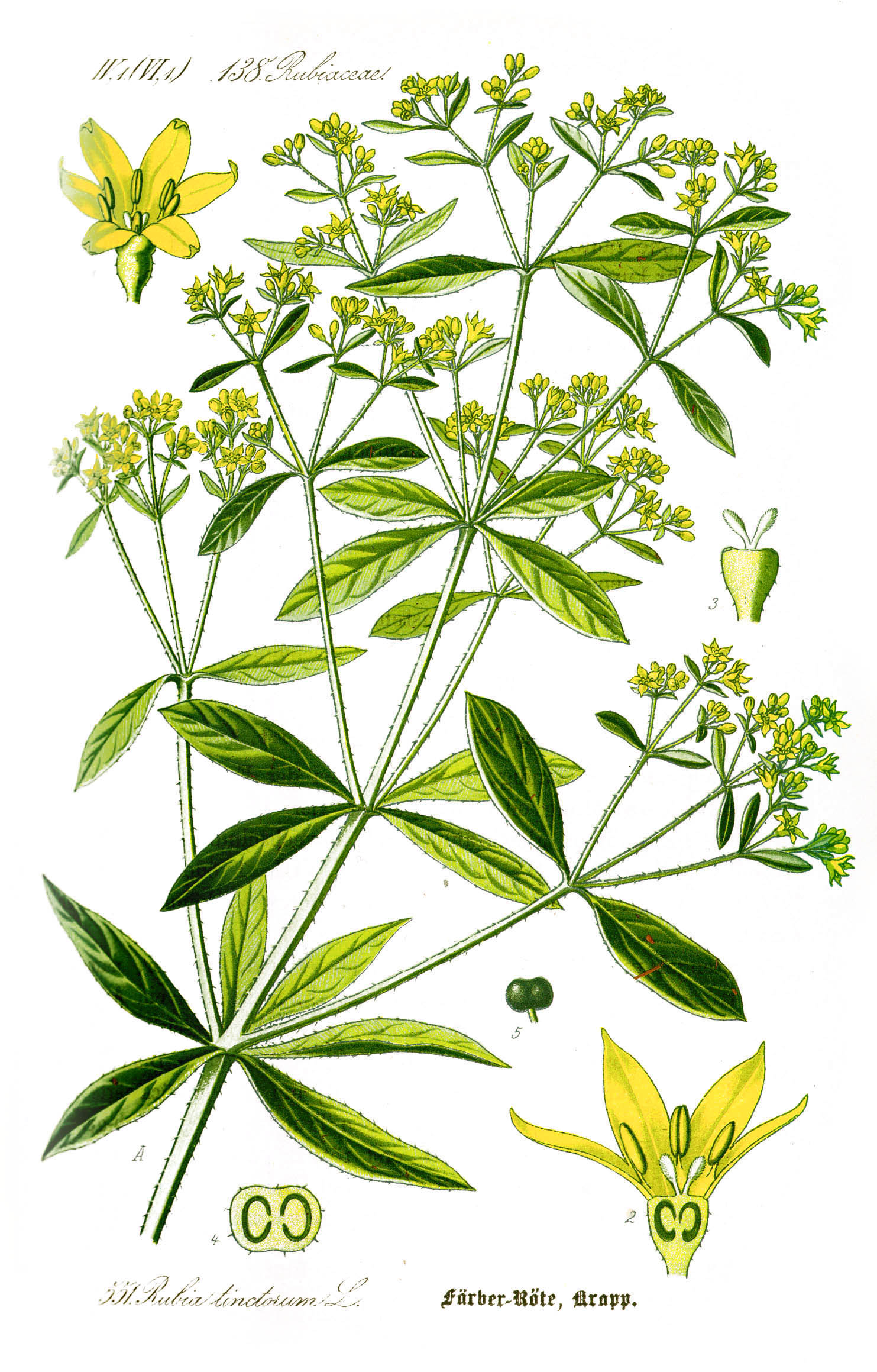 Rubia tinctorum L., syn. Galium rubia E.H.L.Krause